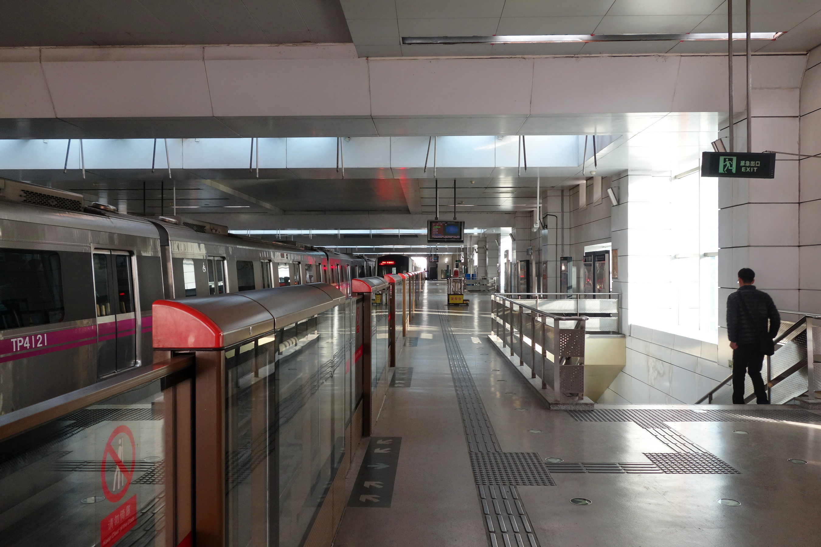 北京地铁5号线天通苑南站侧式站台